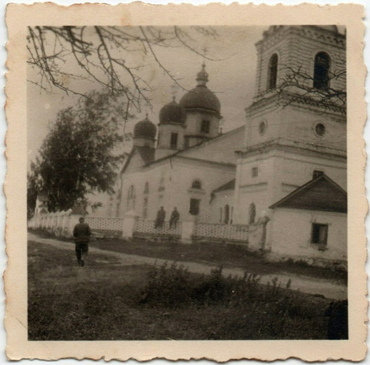 Беларуская (тарашкевіца): Мікулін (Mikulin). Касьцёл пры кляштары бэрнардынаў па маскоўскай перабудове